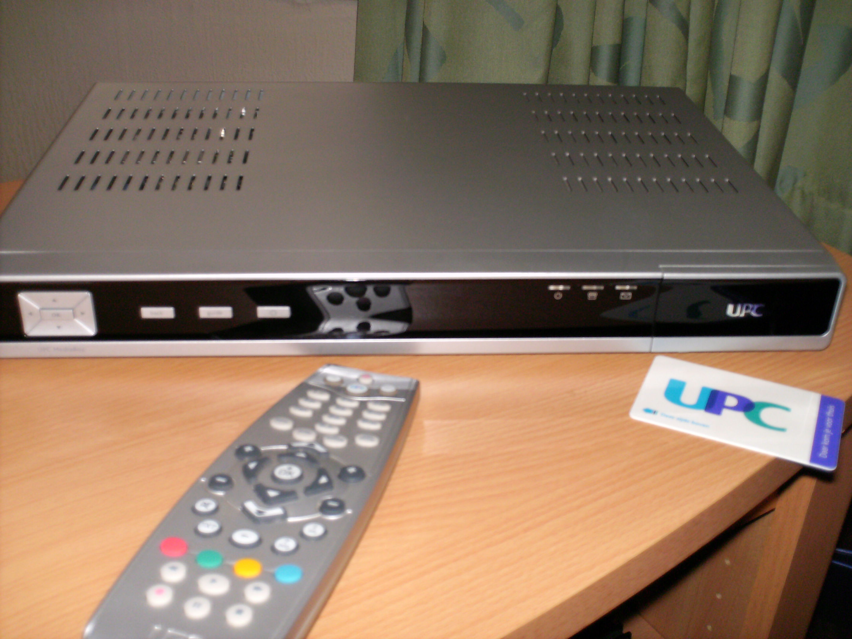 Set-top box voor digitale televisie (DVB)